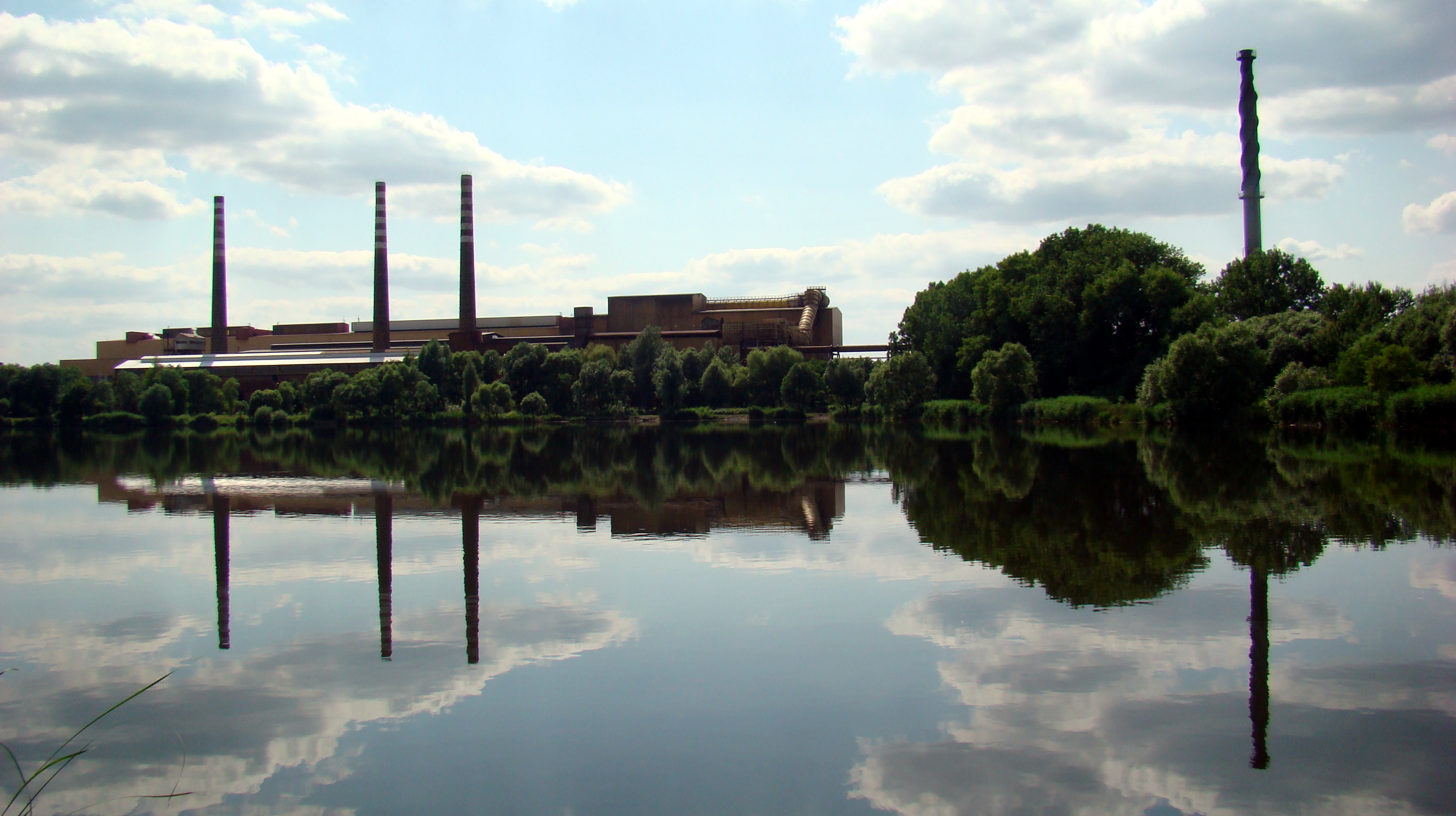 Huta "Częstochowa"